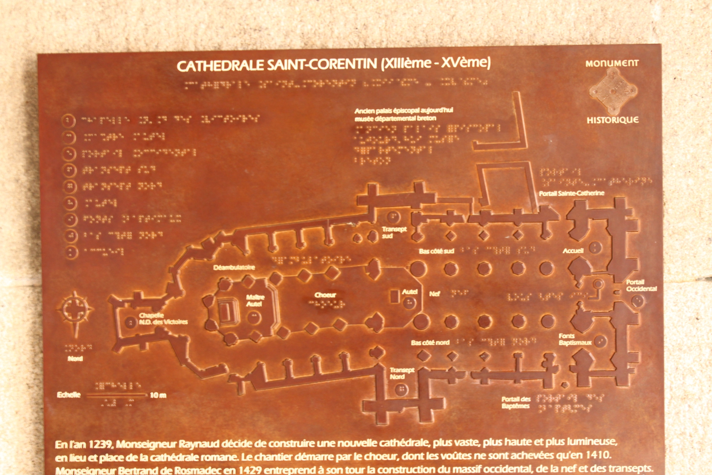 Achsknick der Cathédrale St. Corentin in Quimper